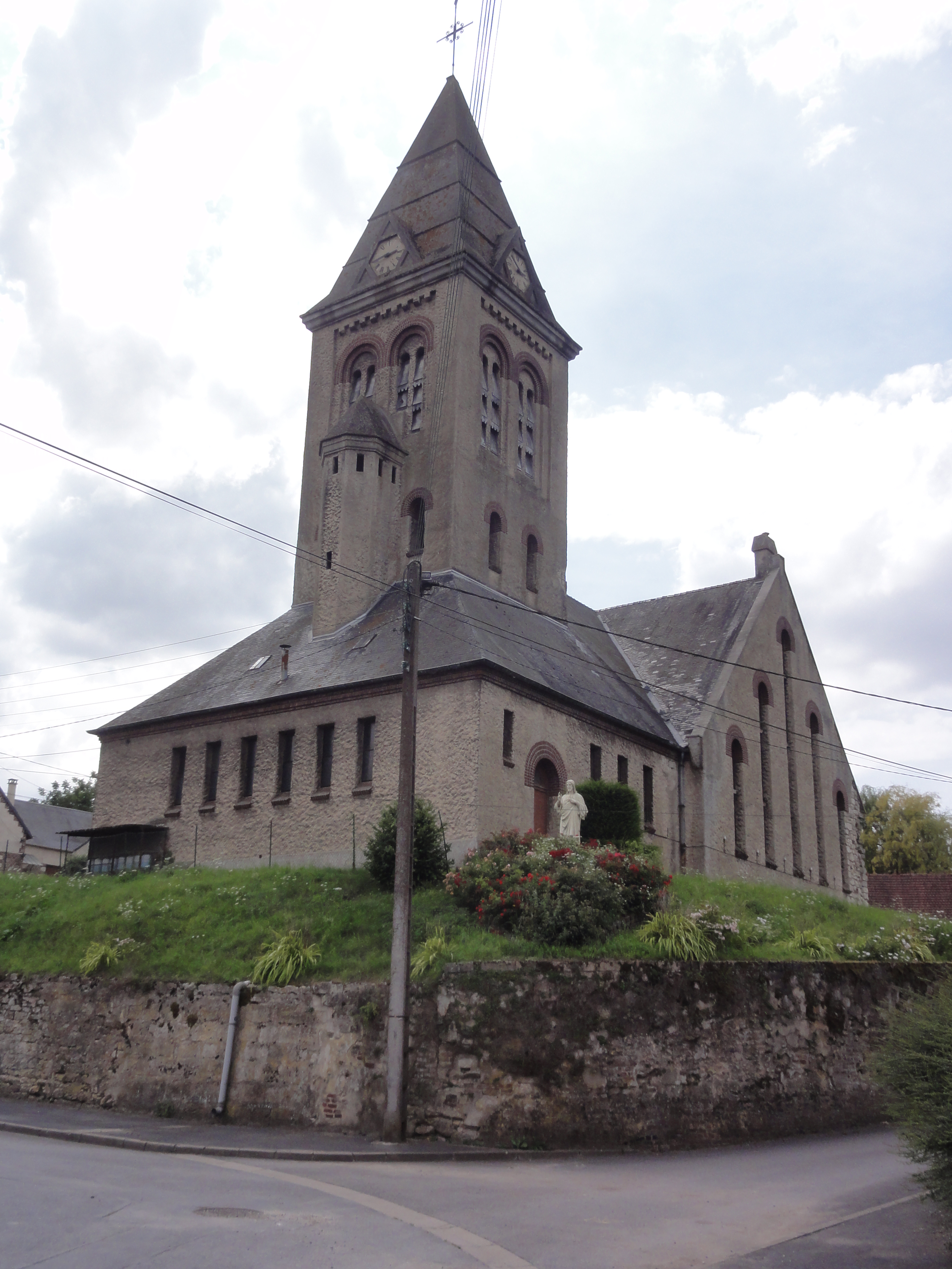 Vendhuile (Aisne) église